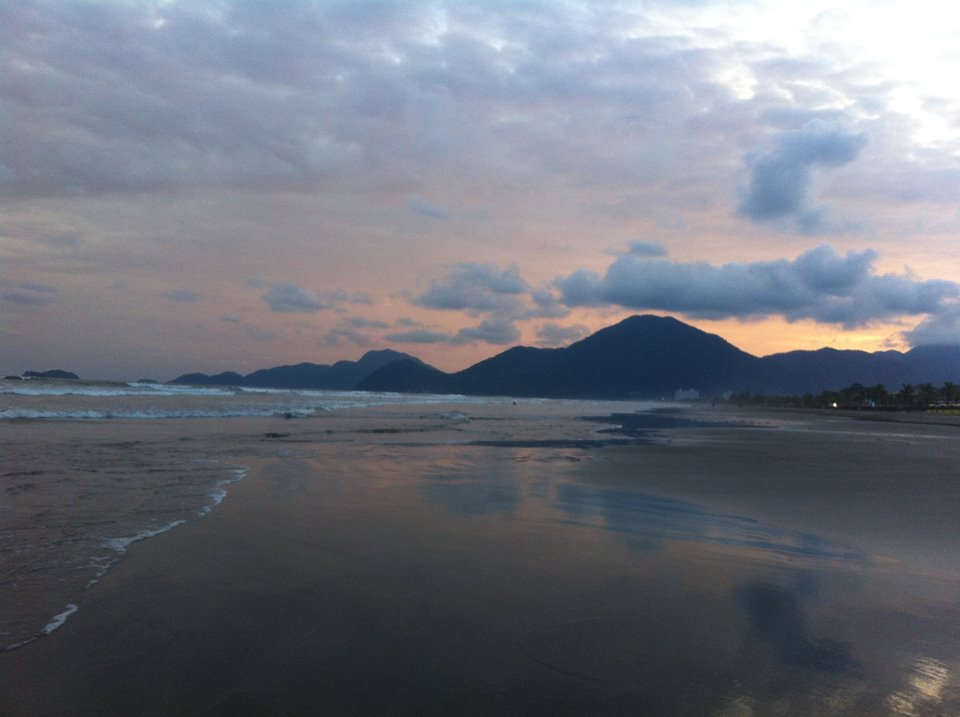 A Estação Ecológica Juréia - Itatins , área representativa de diversos ecossistemas destinada à realização de pesquisas científicas, proteção ambiental e educação ambiental. Abriga cerca de 80.000 ha de Mata Atlântica e ecossistemas associados, tais como :restingas, manguezais, banhados, praias e costões rochosos, reunindo uma fauna rica e diversificada com vários espécies ameaçadas de extinção, tais como tucanos, antas, onça pintada, macaco mono -carvoeiro, papagaio chauá e jacutingas. É parte importante da Reserva da Biosfera Mundial. Tem ainda em seu território parte das Áreas de Proteção Ambiental - APA do Parque Estadual da Serra do Mar, APA Cananéia-Iguape-Peruibe e Área de reserva e Interesse ecológico das ilhas da Queimada Grande e Queimada Pequena. Está localizada ao Sul do litoral Paulista e abrange parte dos municípios de Iguape, Peruibe, Itariri e Miracatu, confrontando-se ainda com o Pedro de Toledo. Neste meio, convive com a natureza uma população tradicional caiçara.